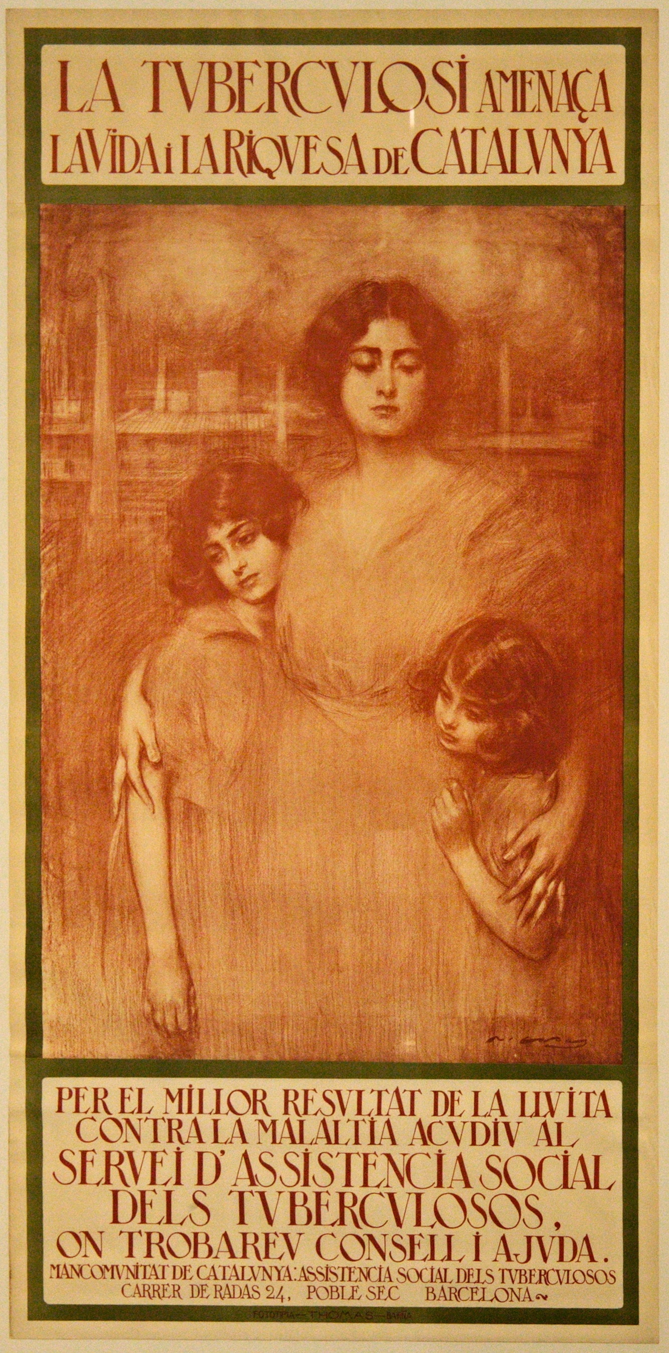 Poster de lluita contra la tuberculosi obra de Ramon Casas promocionat per la Mancomunitat de Catalunya